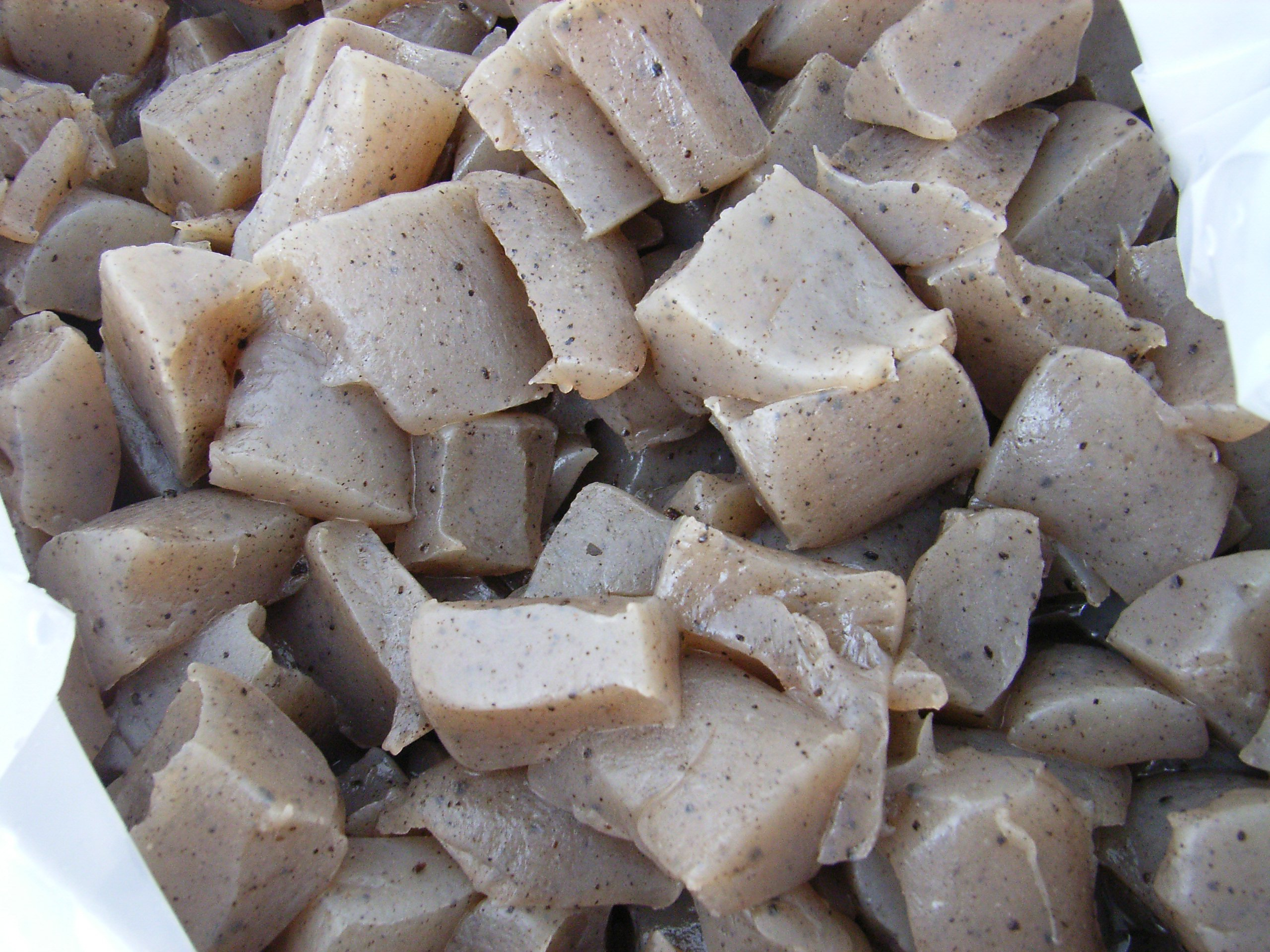 蒟蒻 / konnyaku ( ちぎり / chigiri )